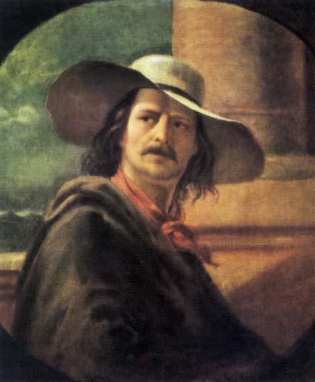 Майков Николай Аполлонович (автопортрет)